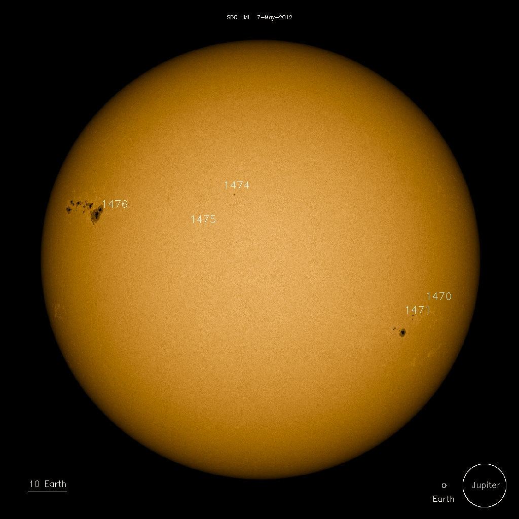 'Monster sunspot' AR1476, May 2012, taken by NASA's SDO